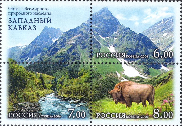 Почтовая марка России